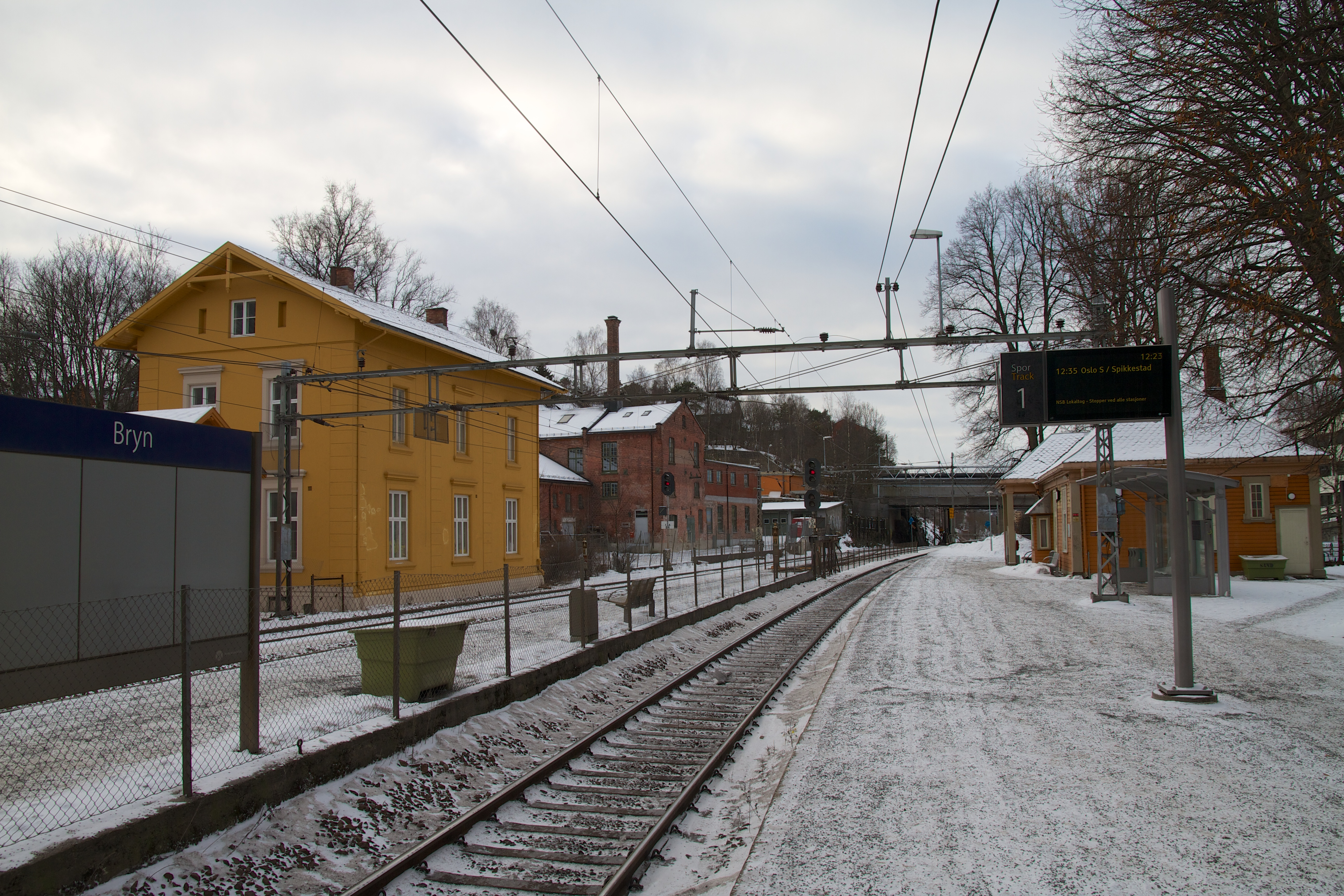 Bryn stasjon i Oslo.